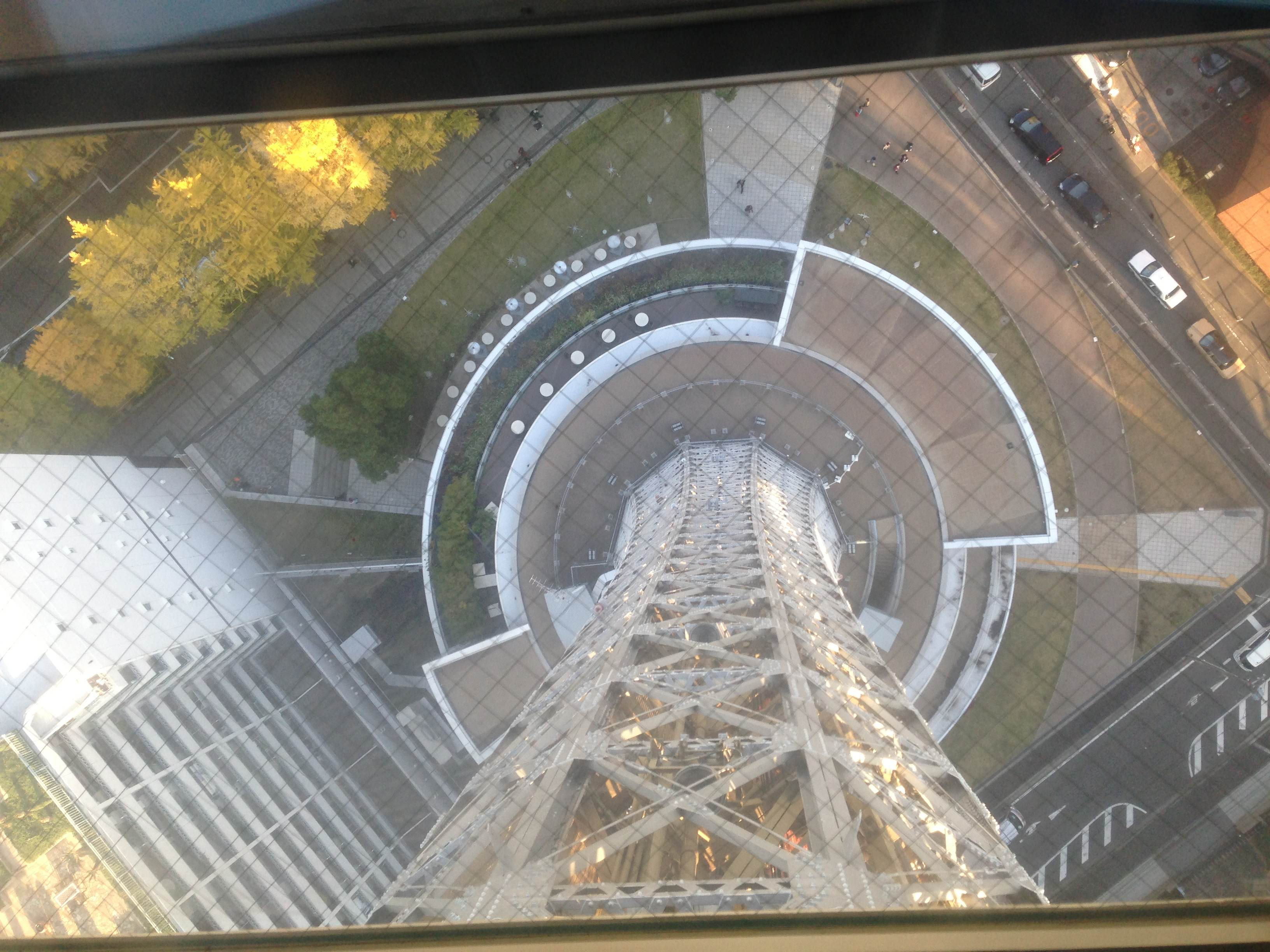 横浜マリンタワーの展望台にある床のガラスにより、真下を見ることができる。